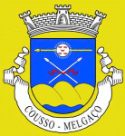 brasão da Freguesia de Cousso - Melgaço